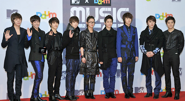 2AM. 2011년 2월, MTV-DAUM 뮤직 페스트에서.